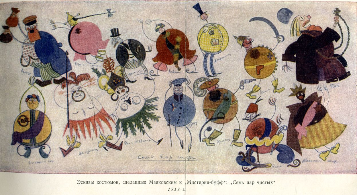 Эскизы костюмов к "Мистерии-буфф".